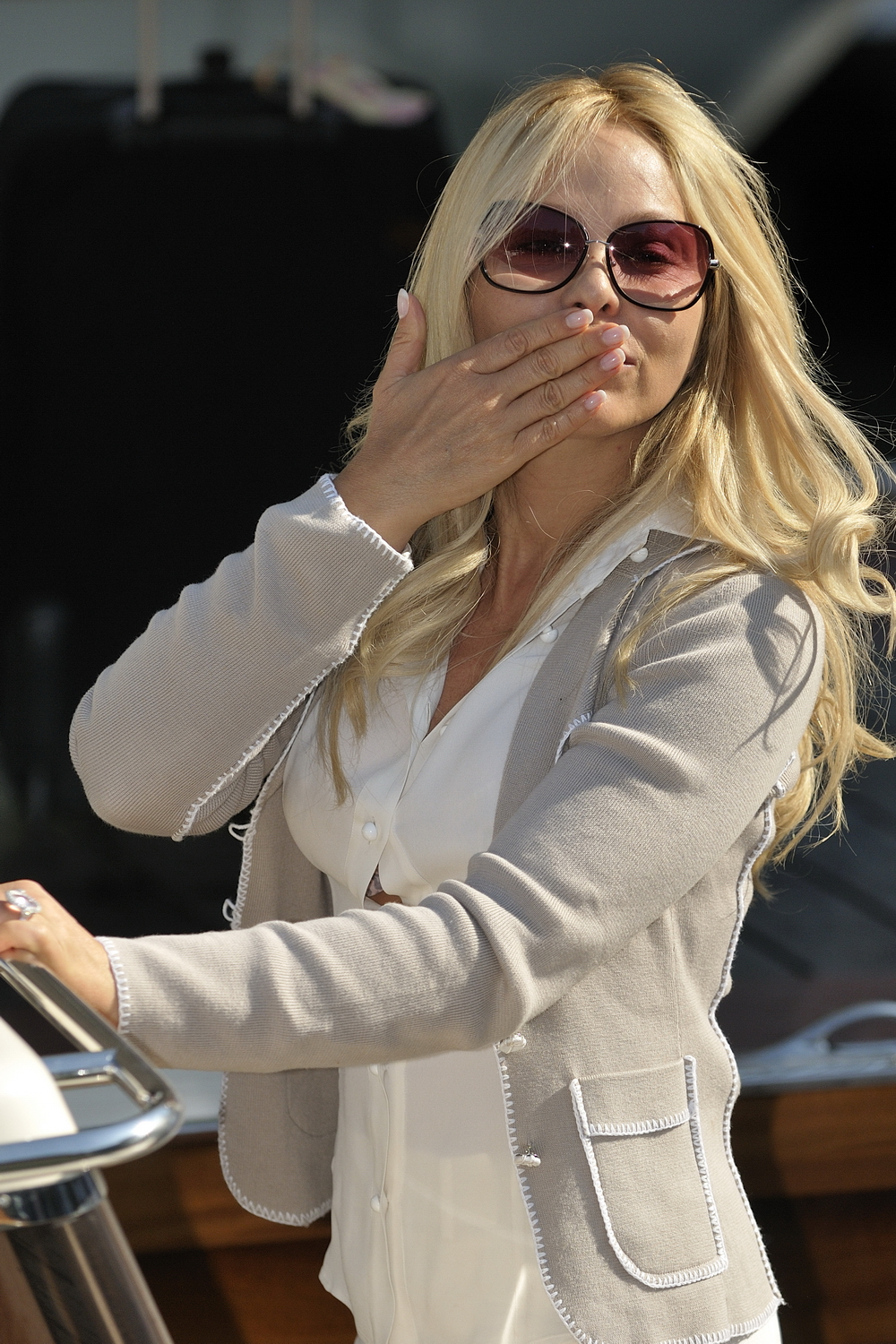 66ème Festival du Cinéma de Venise (Mostra), 6ème jour (07/09/2009) Ornella Muti